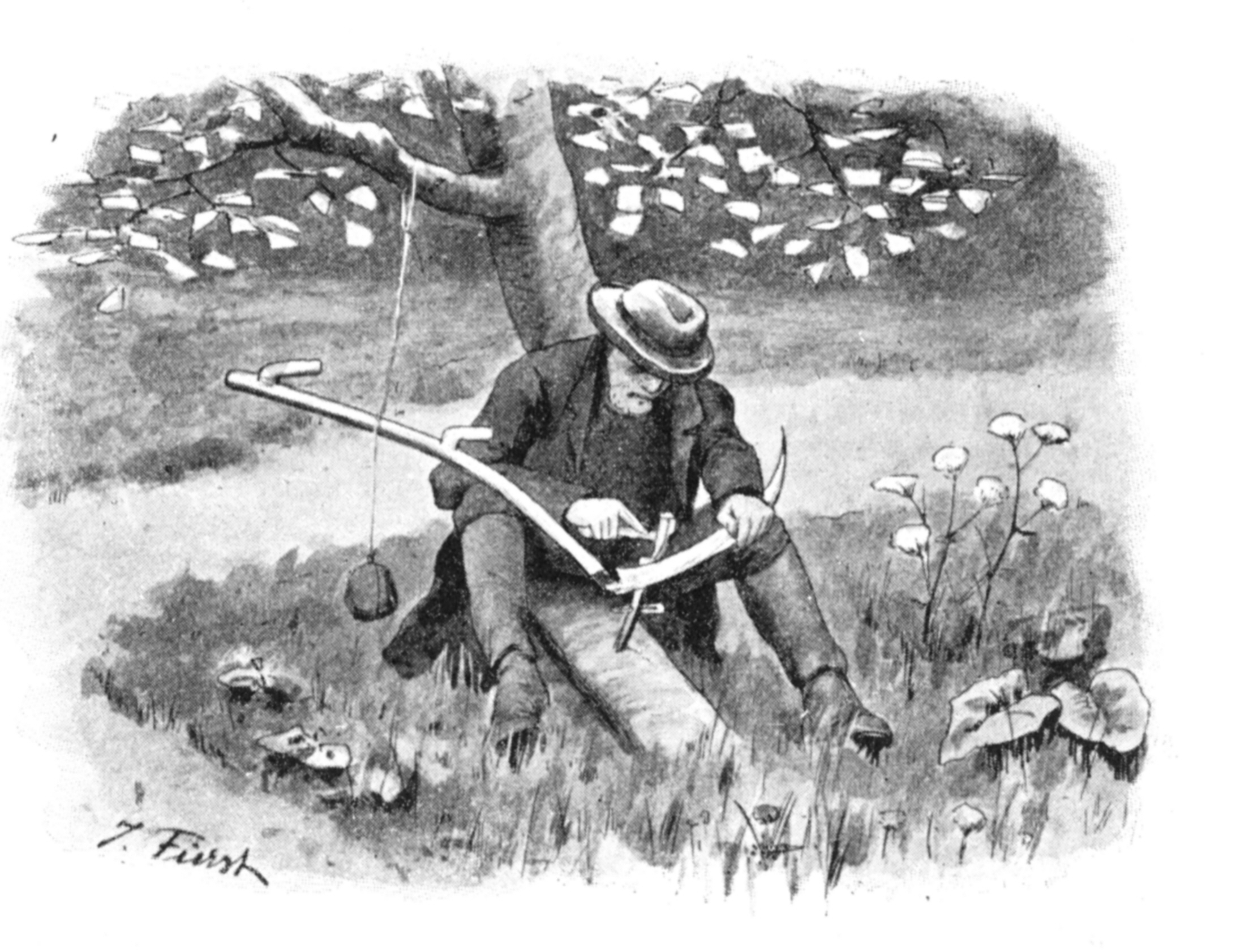 Sensenklopfer, Zeichnung von Julius Fürst um 1895